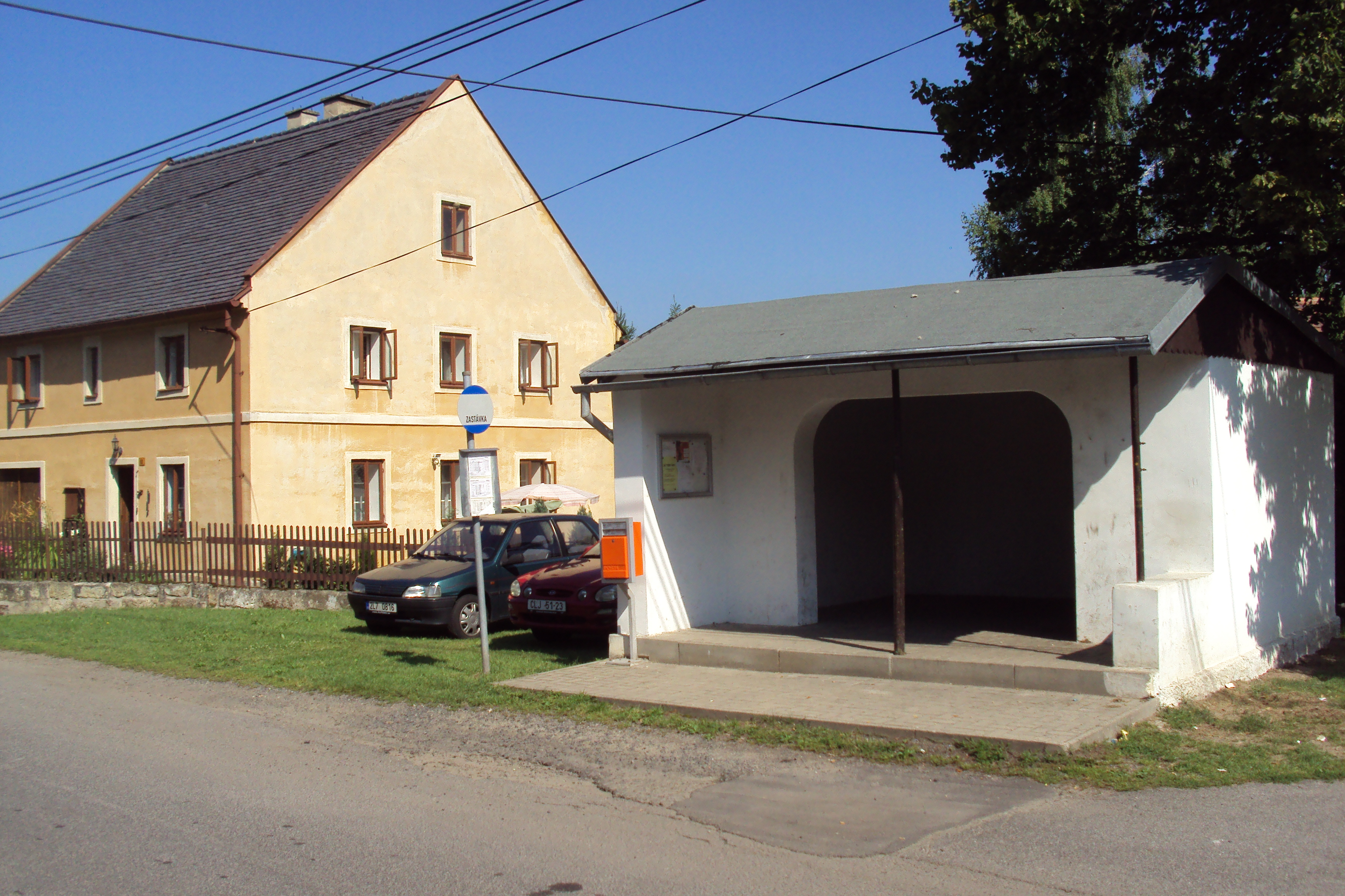 Obec Litice na Českolipsku